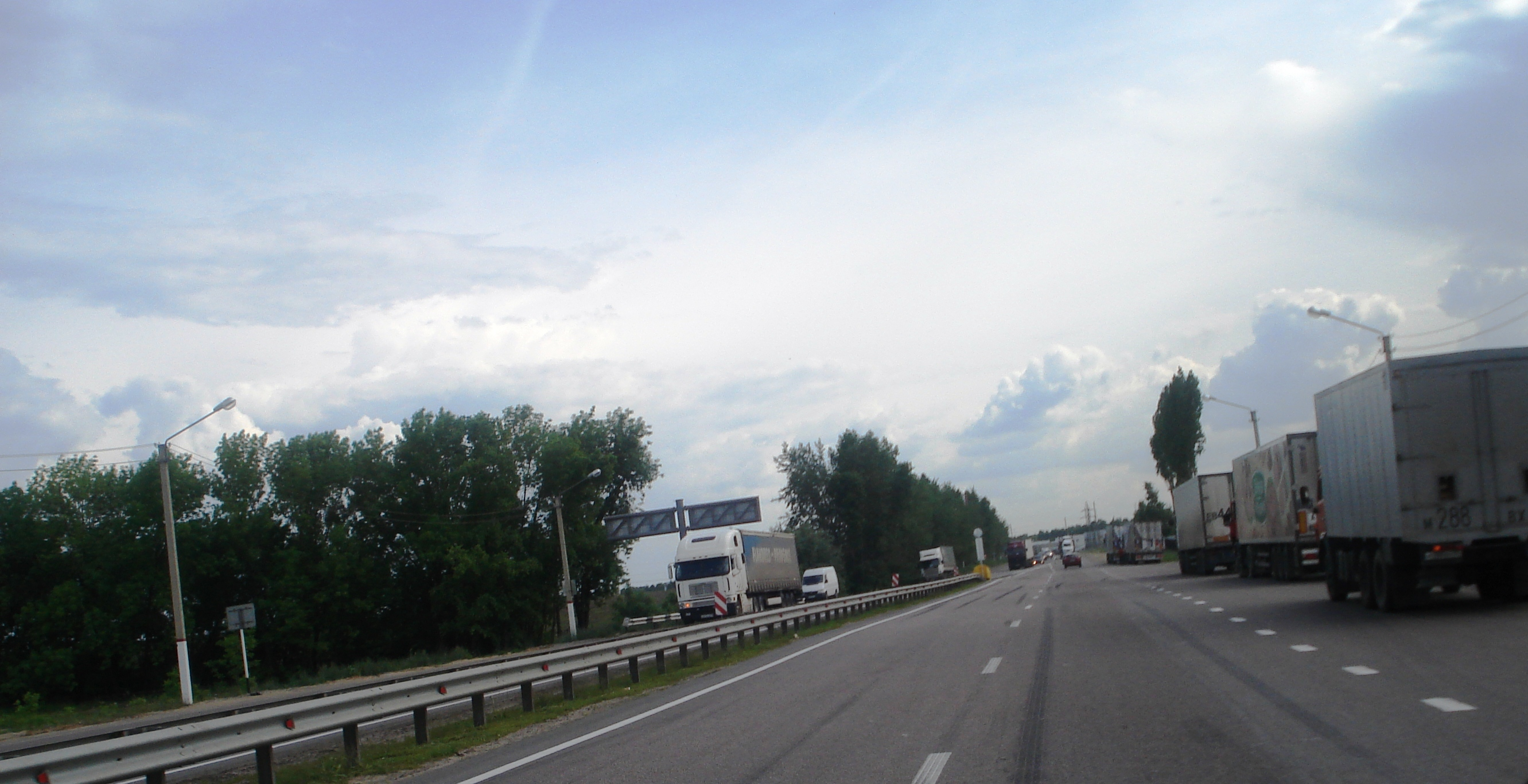 Обход города Воронежа на пересечении с тамбовской трассой